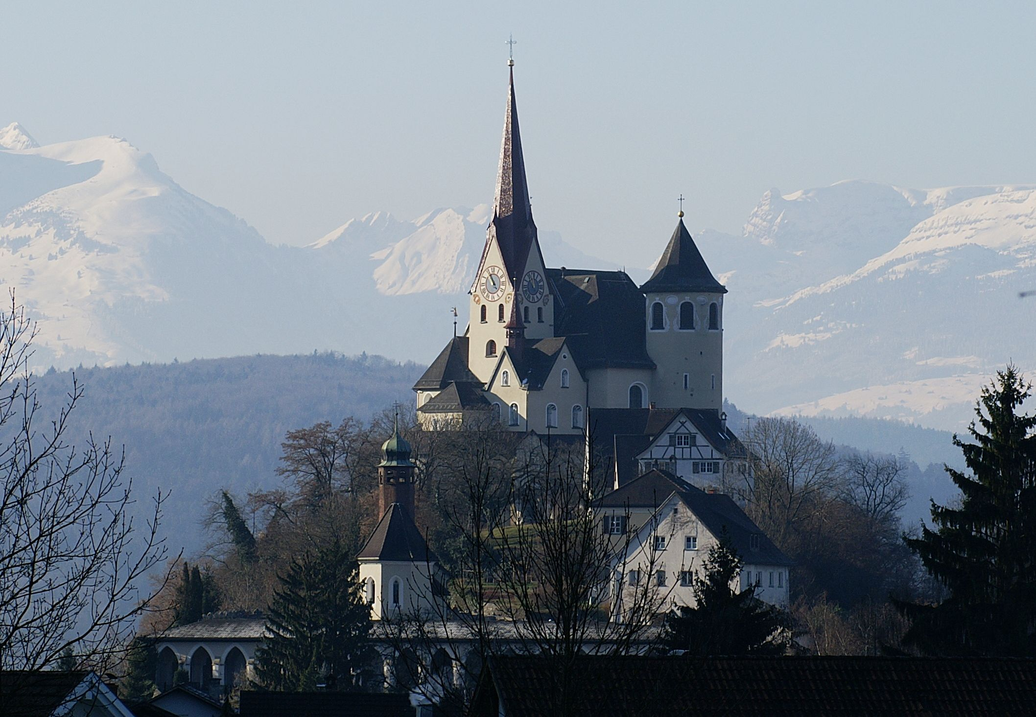 Pfarrkirche: Unsere Liebe Frau Mariä Heimsuchung auf dem Liebfrauenberg in Rankweil, Vorarlberg. Blick von der Abzweigung L51 in die L73 in Richtung Übersaxen. Veröffentlicht: Georg Kessler in "Freizeit im Ländle, Die schönsten Ausflugziele in Vorarlberg ISBN 978-3-7022-3068-5 2010.